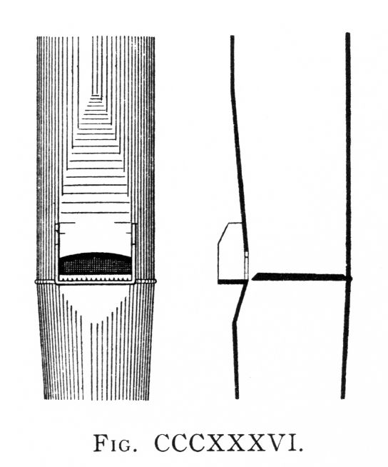 Salicional - orgonaregiszter